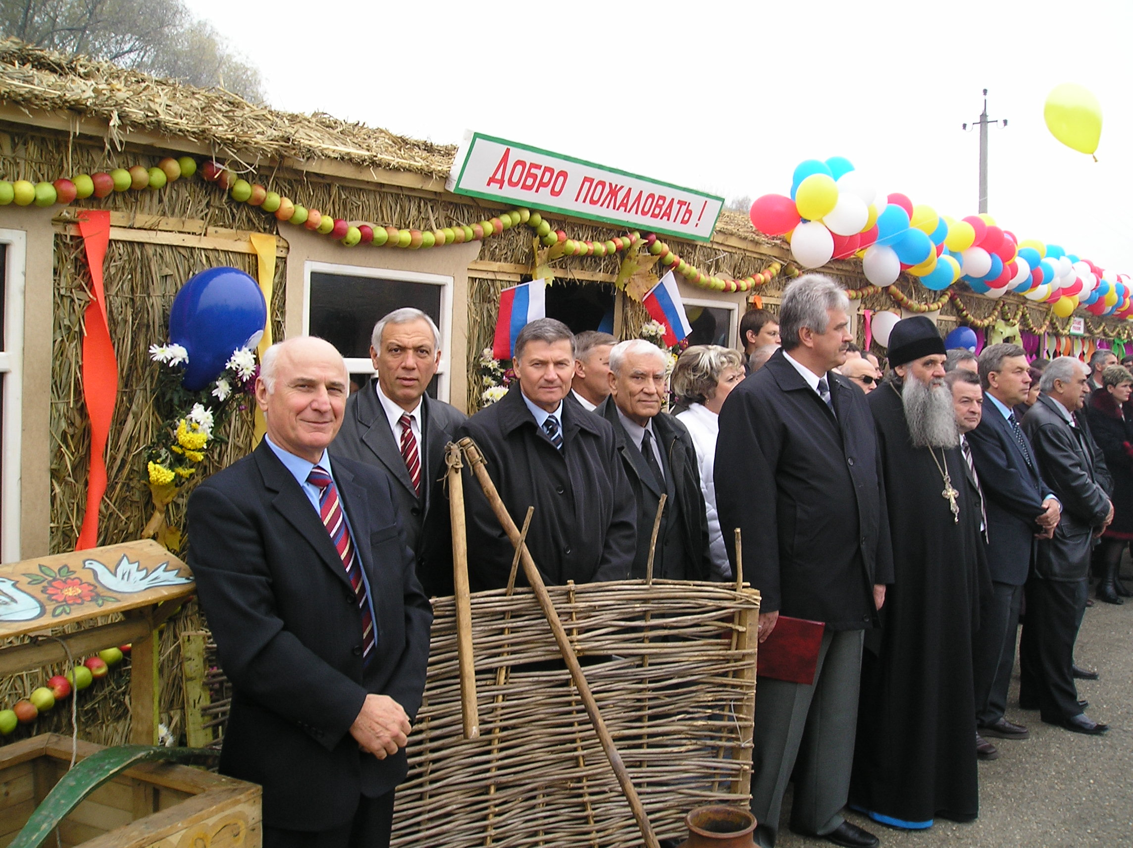 Празднование 75-летия агрофирмы "Сад-Гигант".